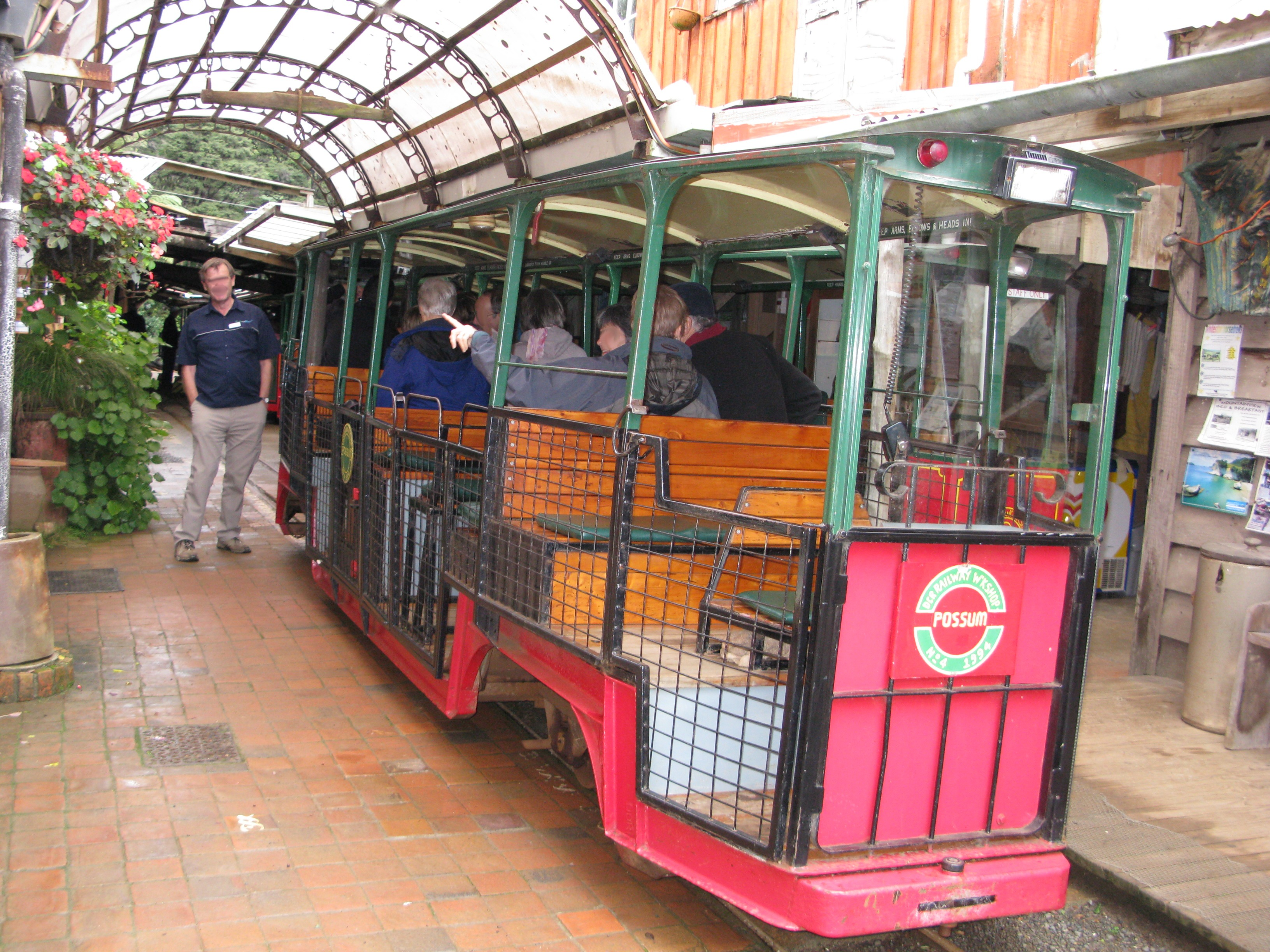 Train au départ au driving creek railway.